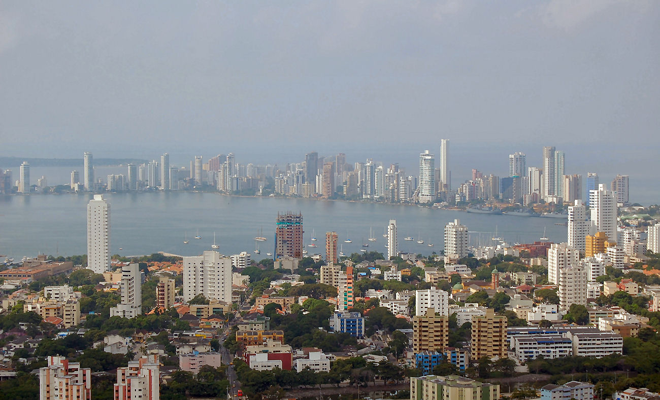 Cartagena de Indias (Colombia) panorámica desde el Cerro de la Popa